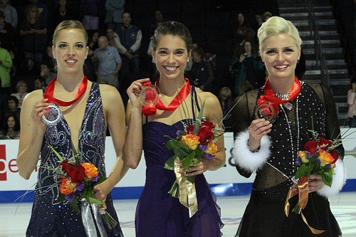 Подиум в женском одиночном катании на турнире 2011 Skate America. Слева на право: Каролина Костнер, Алисса Чизни, Виктория Хельгессон